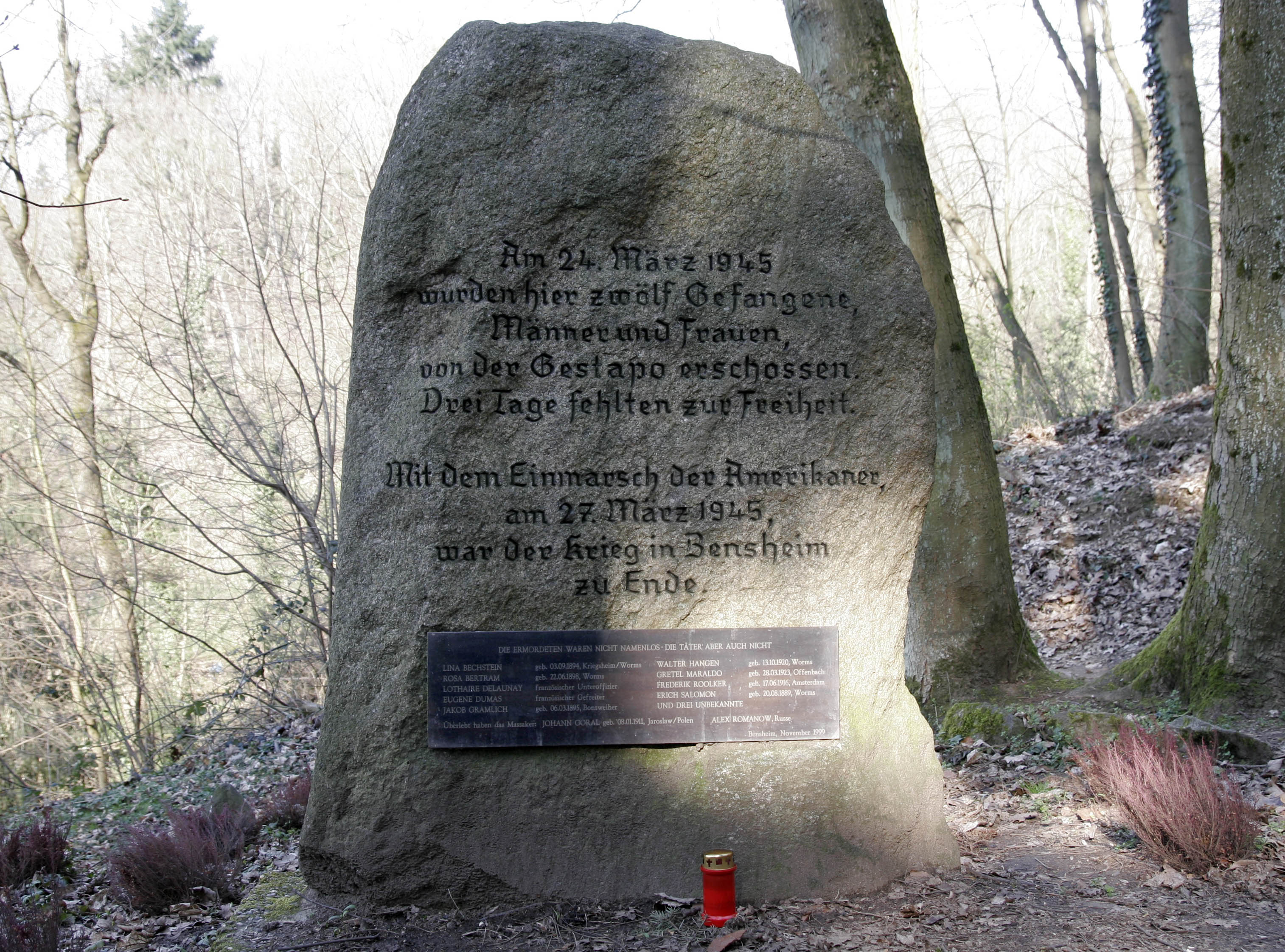 Gedenkstein an das Massaker am 24. März 1945 in Bensheim, unterhalb des Kirchberges.